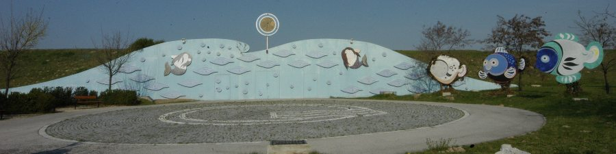 Vorderfront des Behälters Bisamberg der Wiener Wasserwerke in Floridsdorf